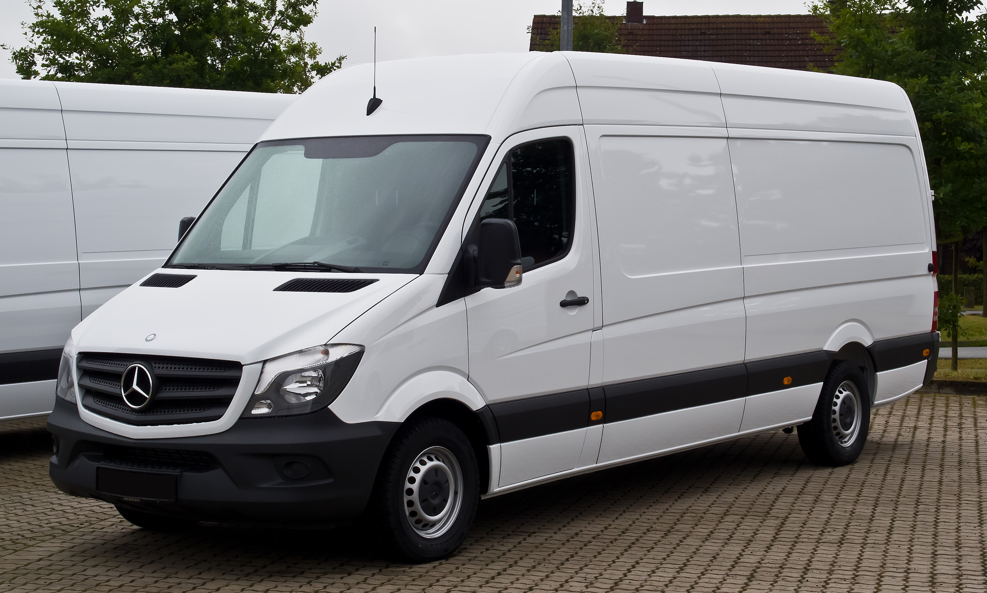 Mercedes-Benz Sprinter Kastenwagen 313 CDI (W 906, Facelift)